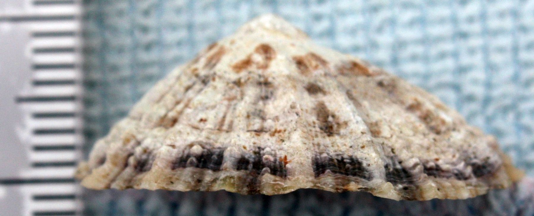 Albuesnegl Patella vulgata fra siden